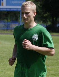 Barłomiej Pawłowski w barwach Warty Poznań